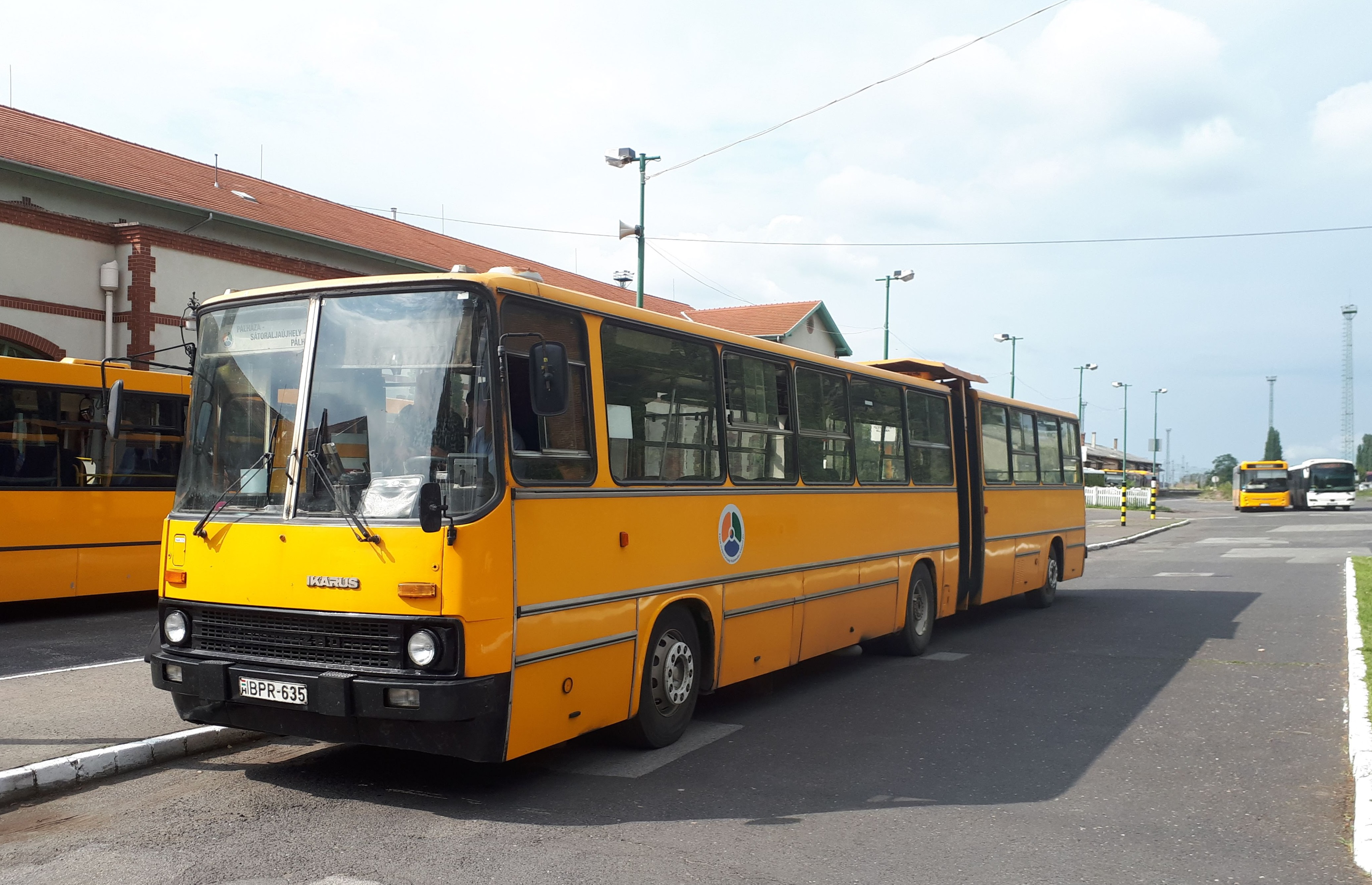 Az ÉMKK BPR-635 rendszámú Ikarus 280 típusú busza Sátoraljaújhelyen, a 3900-as helyközi járaton.